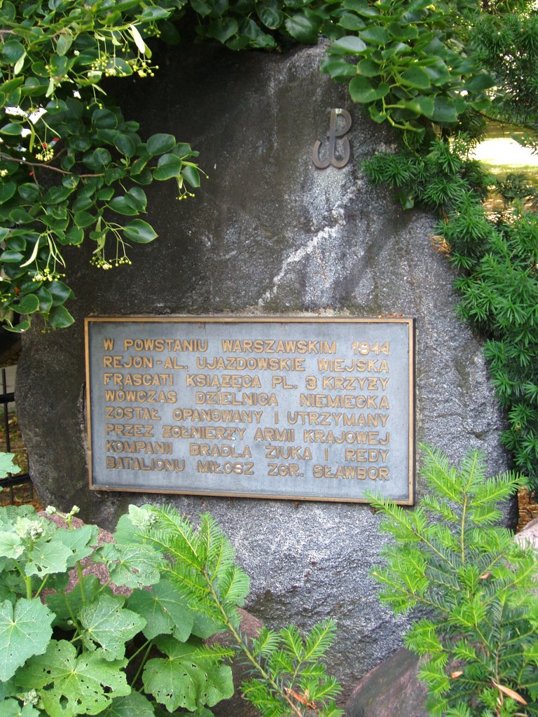 W skwerze u zbiegu ul. Prusa i Konopnickiej w Warszawie (fot Zu)